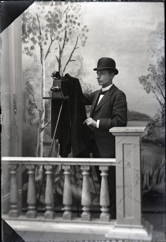 Georg Nyström i sin atelje i Torshälla.